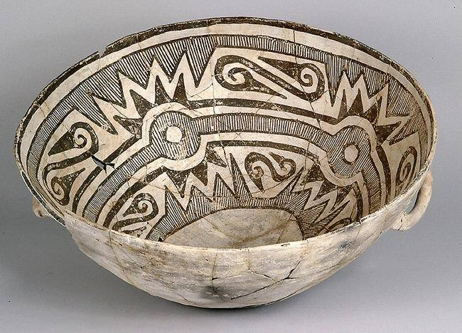 Chaco Anasazi bowl.